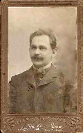 אהרון קרון, צולם בקובנה, ליטא, לקראת עלייתו לארץ ישראל, שנה 1910